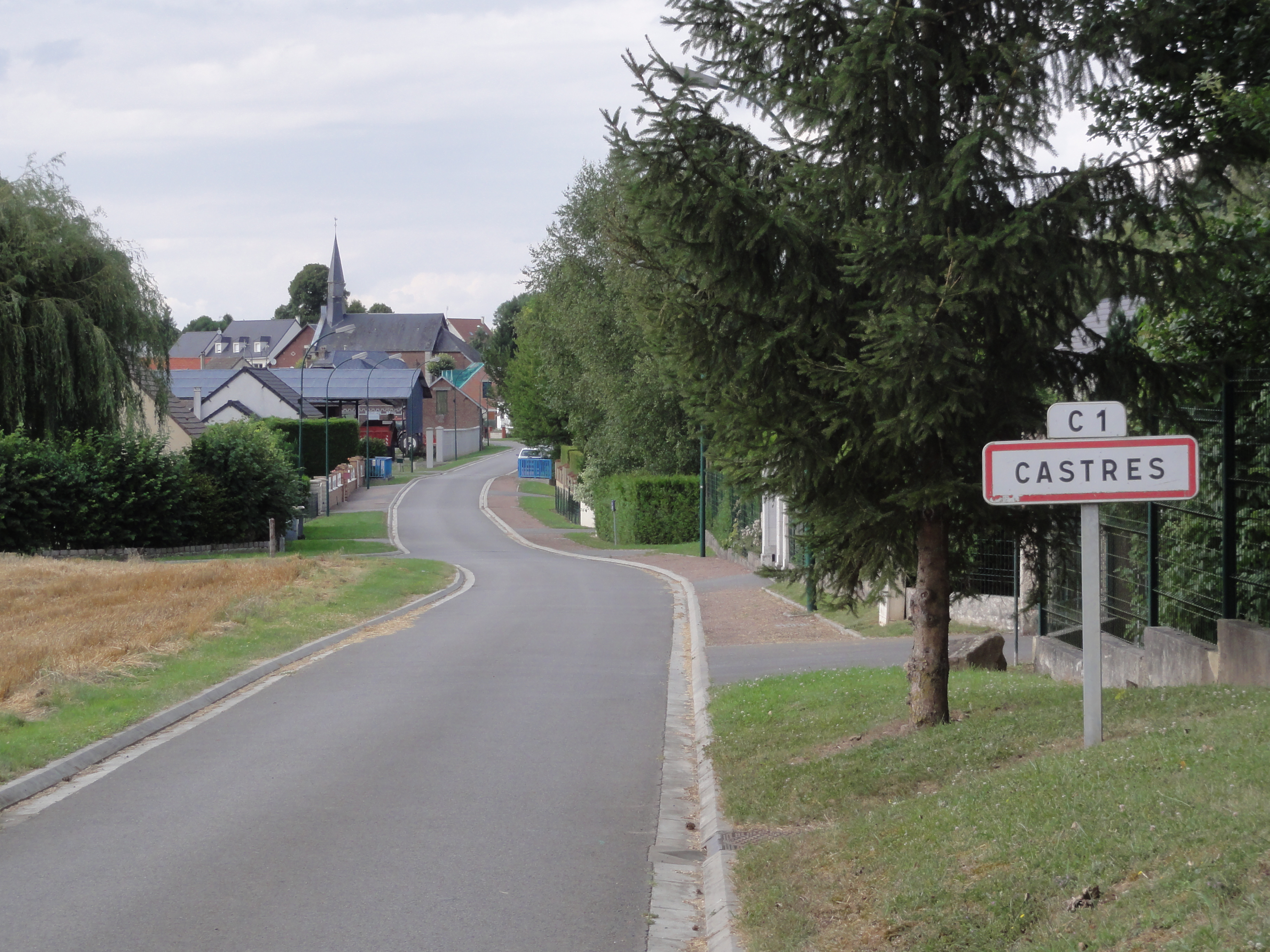 Castres (Aisne) city limit sign